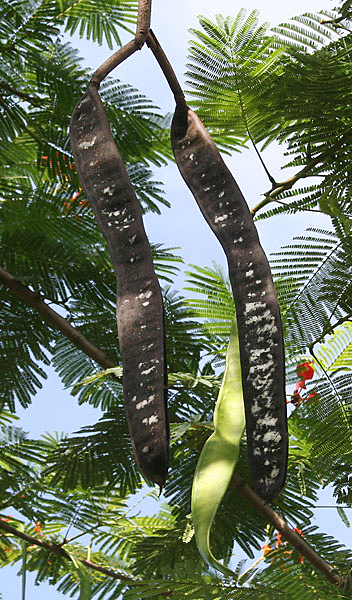 Gulmohur Delonix regia in Kolkata, West Bengal, India.